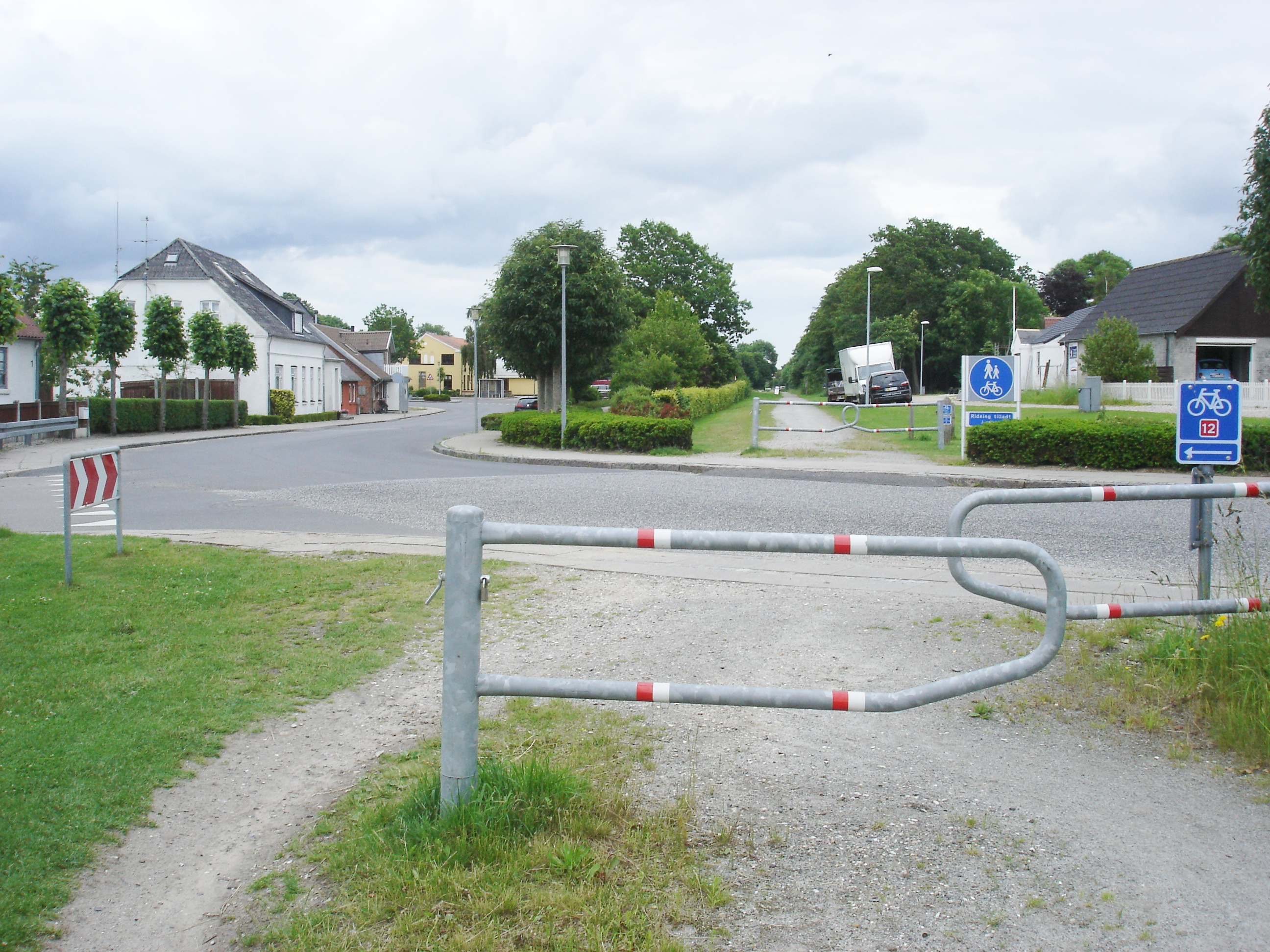 Himmerlandsstien krydser Højskolebakken i Skals - det gule hus i baggrunden er Skals Kro